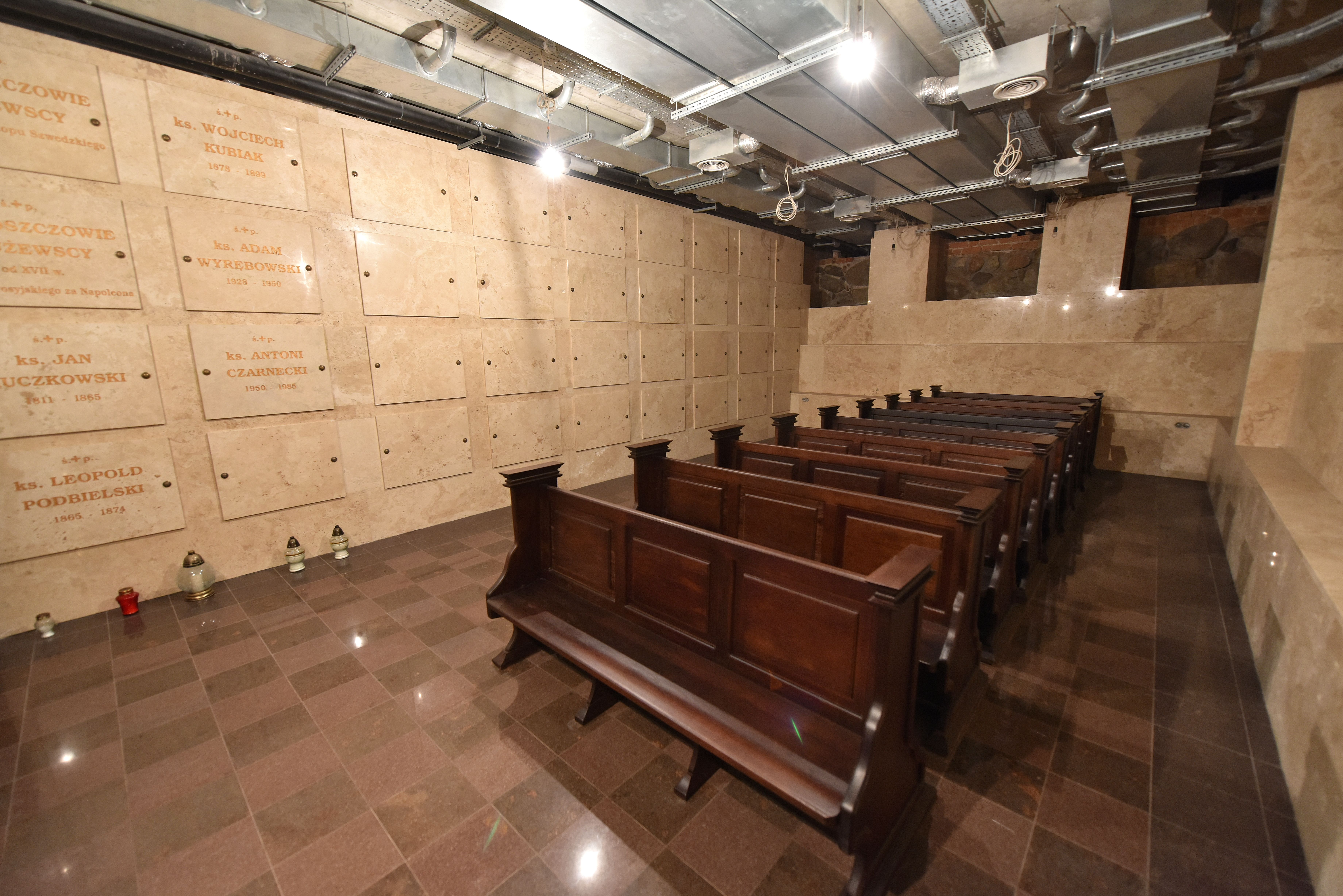 Podziemia kościoła św. Katarzyny w Warszawie